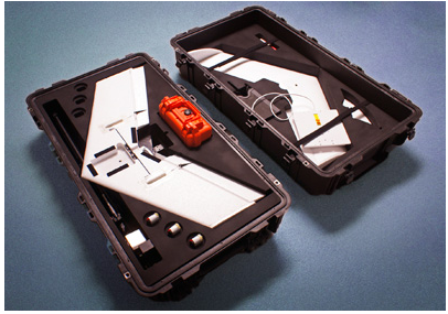 Lehmann Aviation UAV standard kit